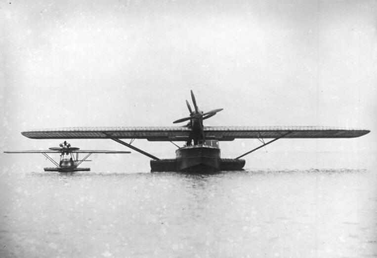 Mutter und Kind! Das größte Dornier-Flugboot der Welt mit seinen 450 PS-Motoren in welchem 30 Personen befördert werden können und das kleinste Flugboot der Welt, "Libelle", auf dem Bodensee in Friedrichshafen.